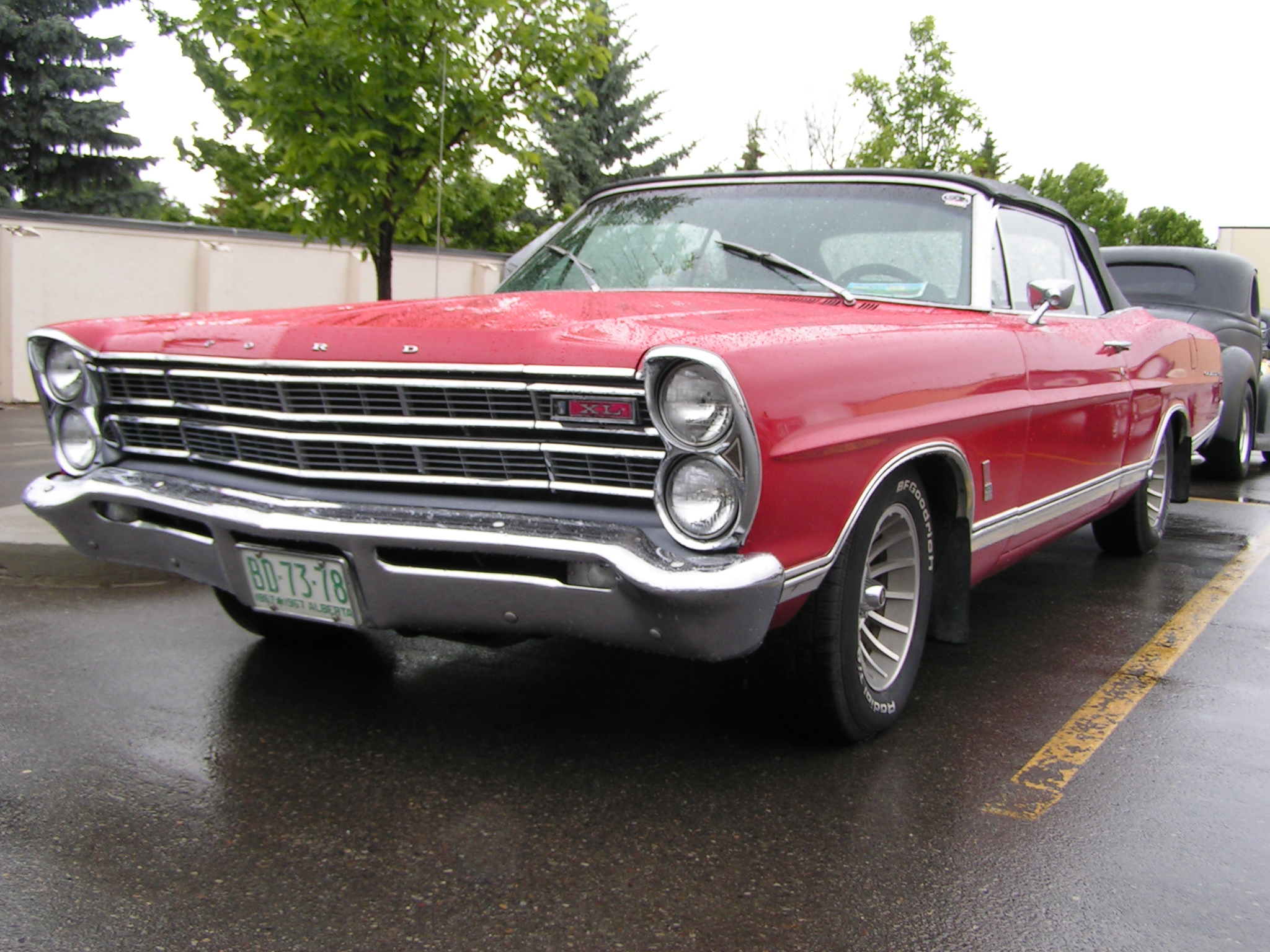 1967 Ford Galaxie 500XL